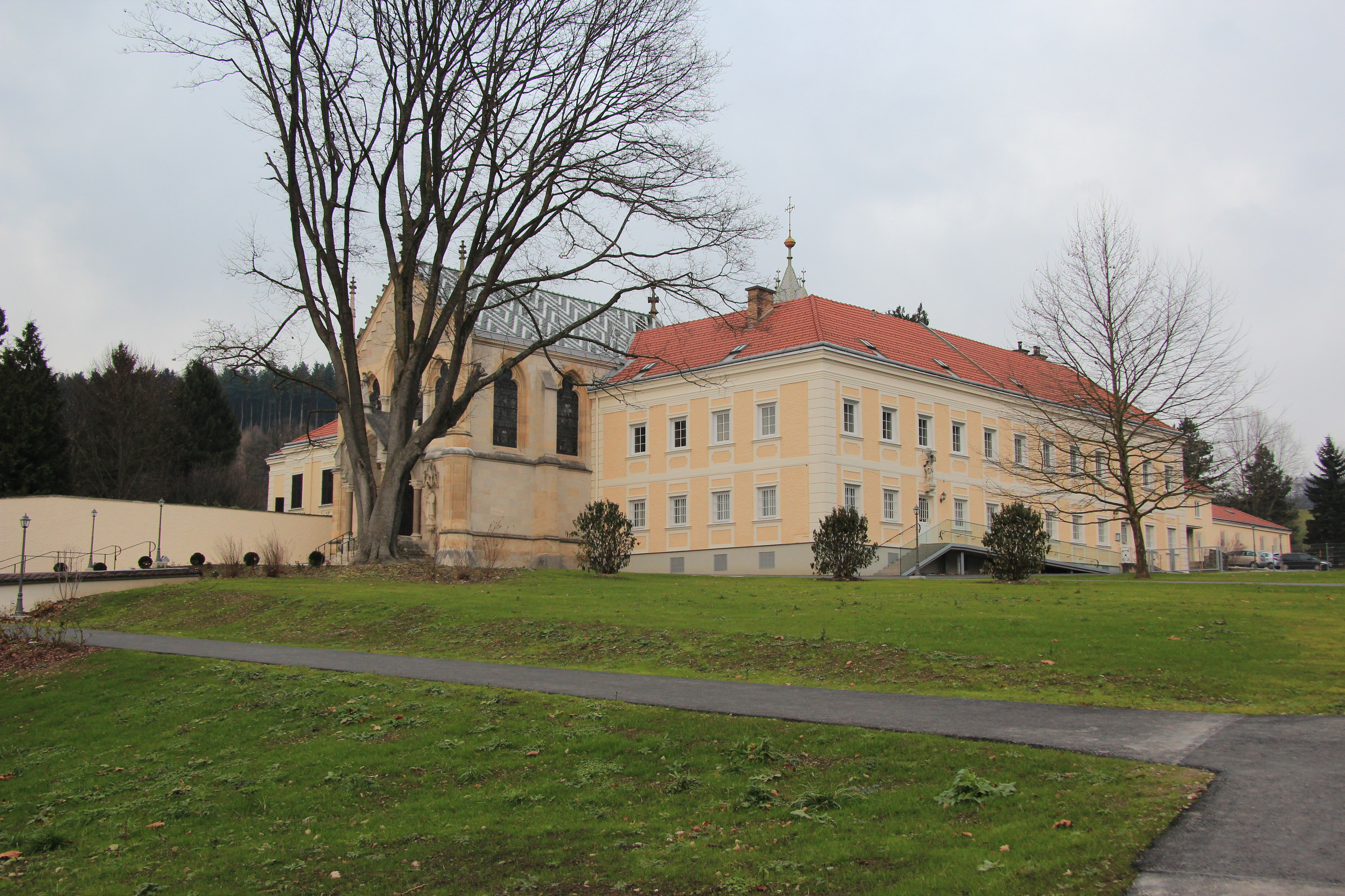 Karmel Mayerling in Niederösterreich